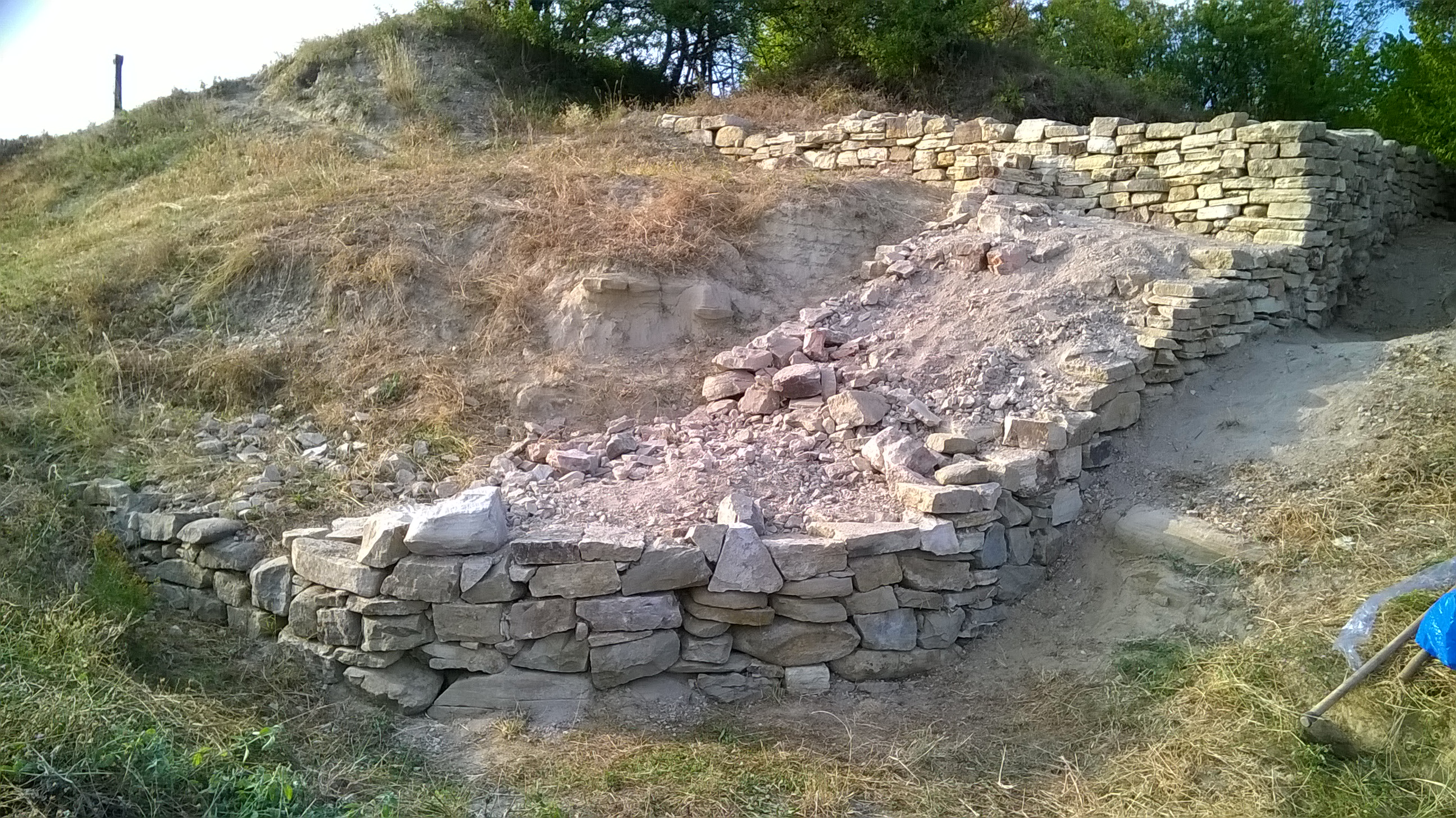 Ruinele de sud-est ale cetății Unguraș ( jud. Cluj )